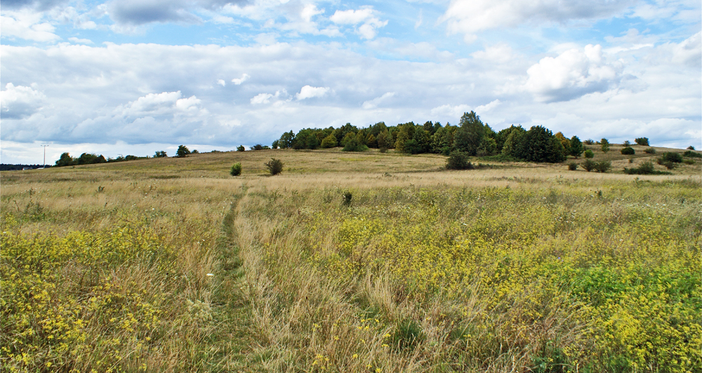 Landschaftsschutzgebiet Münchshofer Berg (Stadt Teublitz), eine typische Landschaft im Oberpfälzer Jura